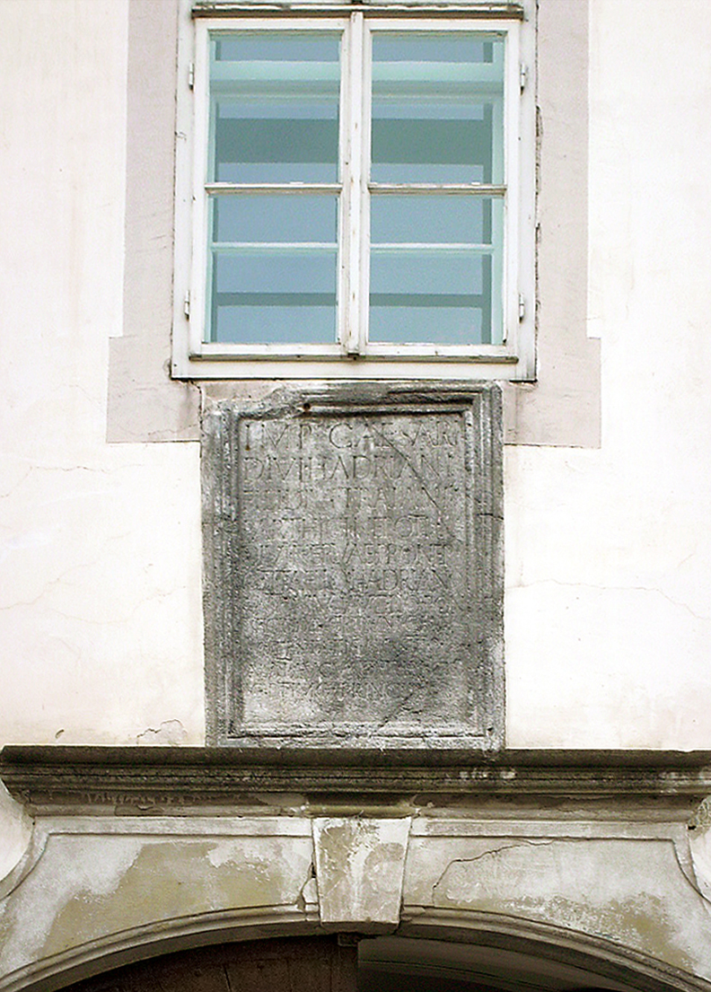 Schloß Traismauer/NÖ, Weiheinschrift der ala I Augusta Thracum an Kaiser Marc Aurel. Die seit dem 16. Jahrhundert bekannte und in die Jahre 140 bis 144 n. Chr. datierbare Inschrift könnte die Bauinschrift des Steinlagers I oder eine Ehreninschrift zu einer Kaiserstatue gewesen sein. Literatur: CIL III 05654; CIL III 11795. Text: Imp(eratori) Caesari / divi Hadriani / fili(o) divi Traiani / Parthici nepoti / divi Nervae pronep/oti T(ito) Aelio Hadriano / Antonino Aug(usto) Pio pont/ifici maximo tribuniciae / potestatis co(n)s(uli) III p(atri) p(atriae) / ala I Augusta Thracum / optimo principi